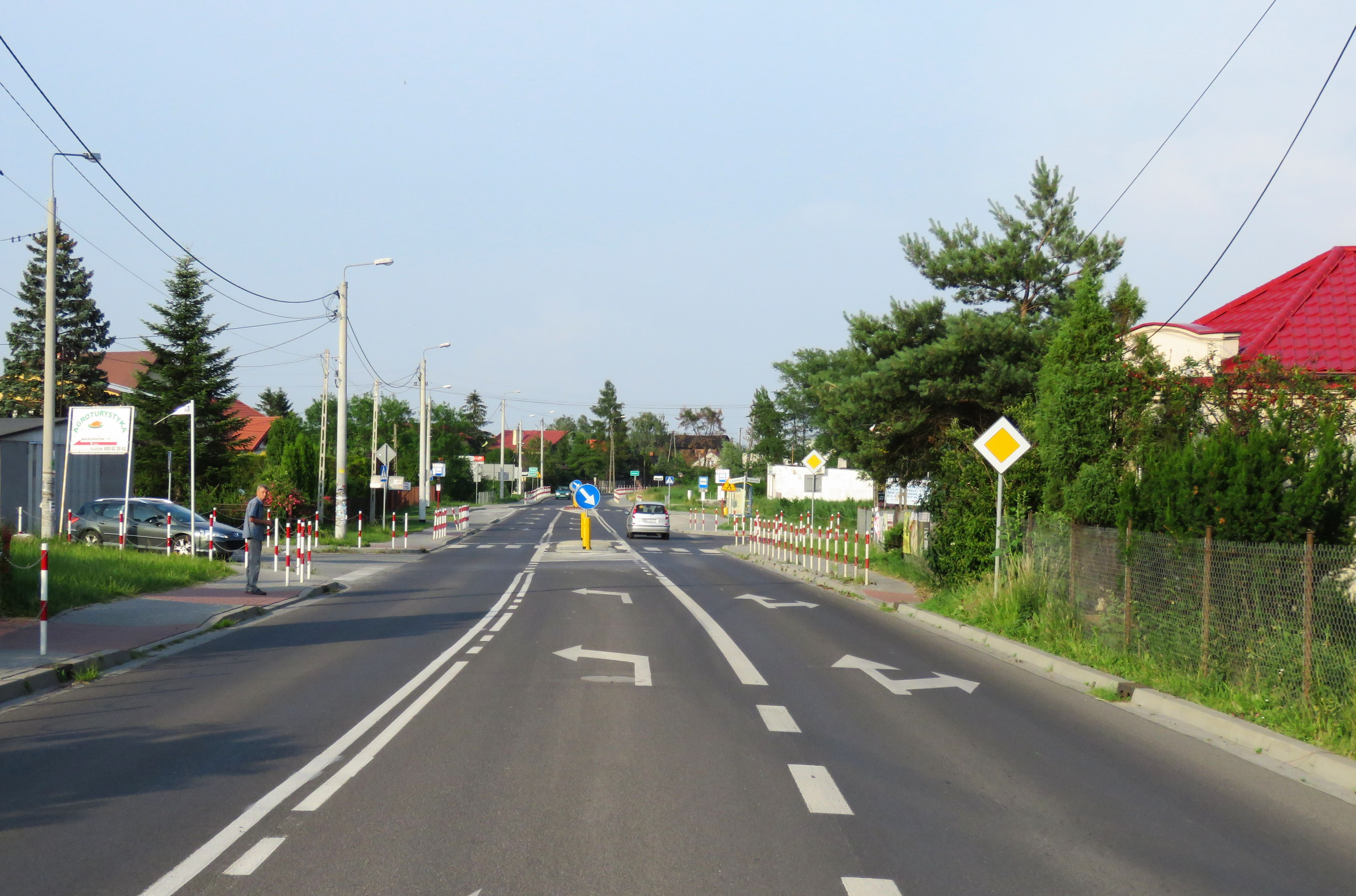 Grądy gm. Leszno